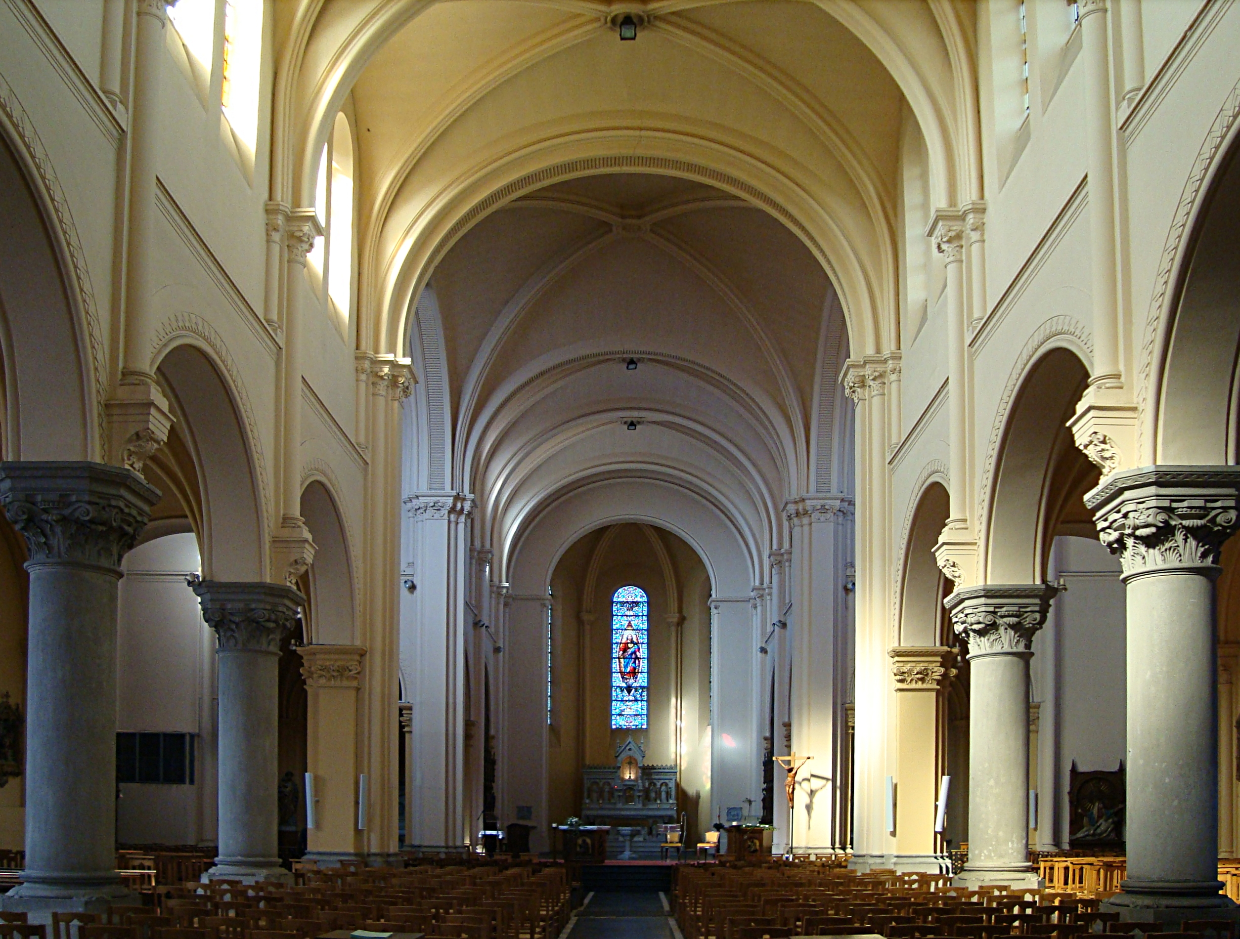 Vue intérieure de l'église Saint-Vaast de Bondues (Nord).